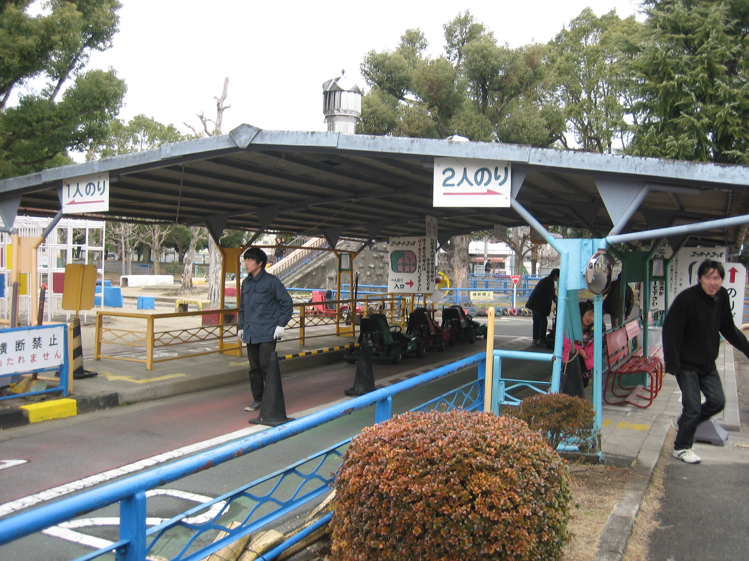 大宮交通公園を園内から撮影